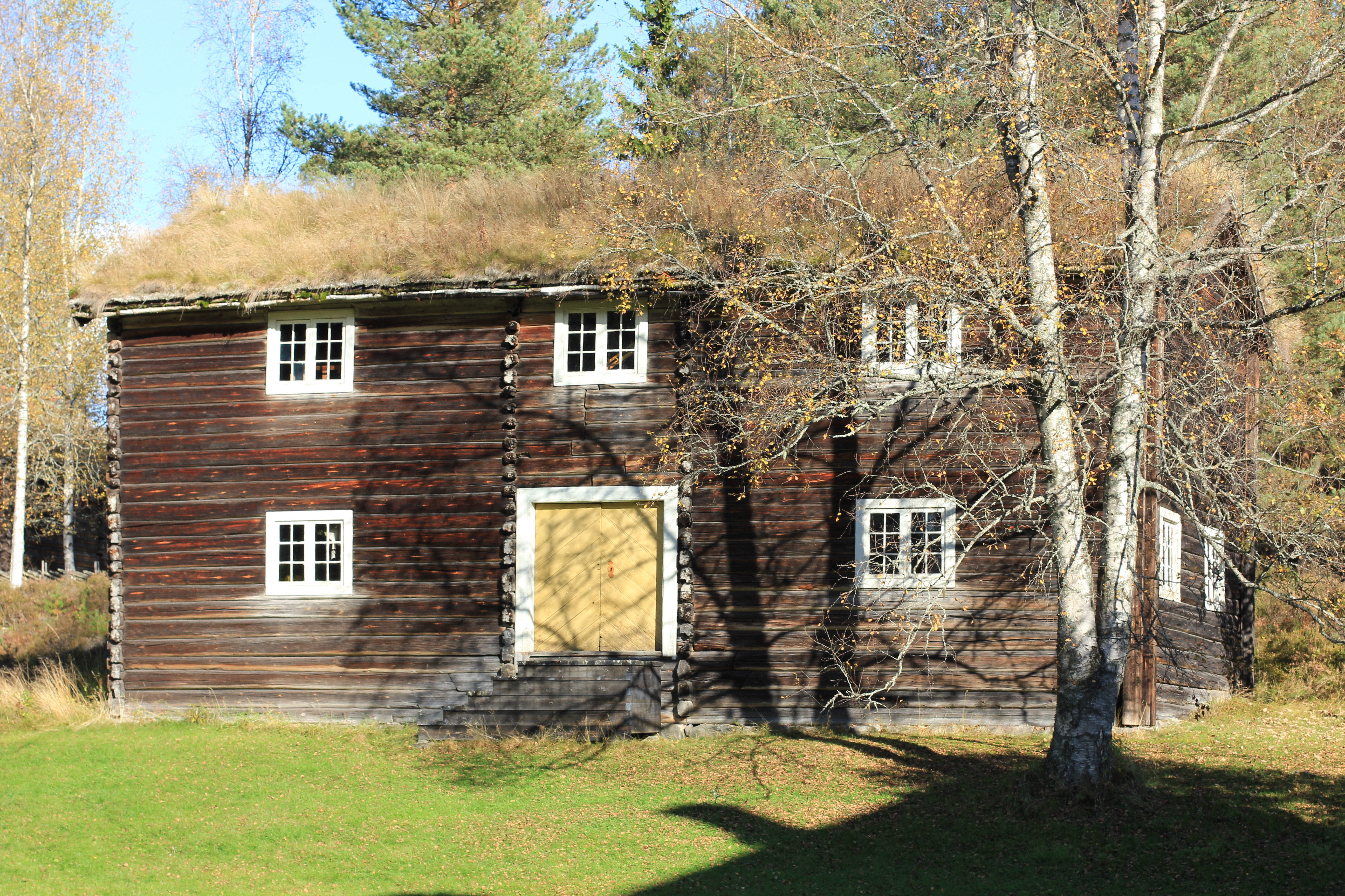 Tunbjørka og tømmerstua ved Glomdalsmuseet.